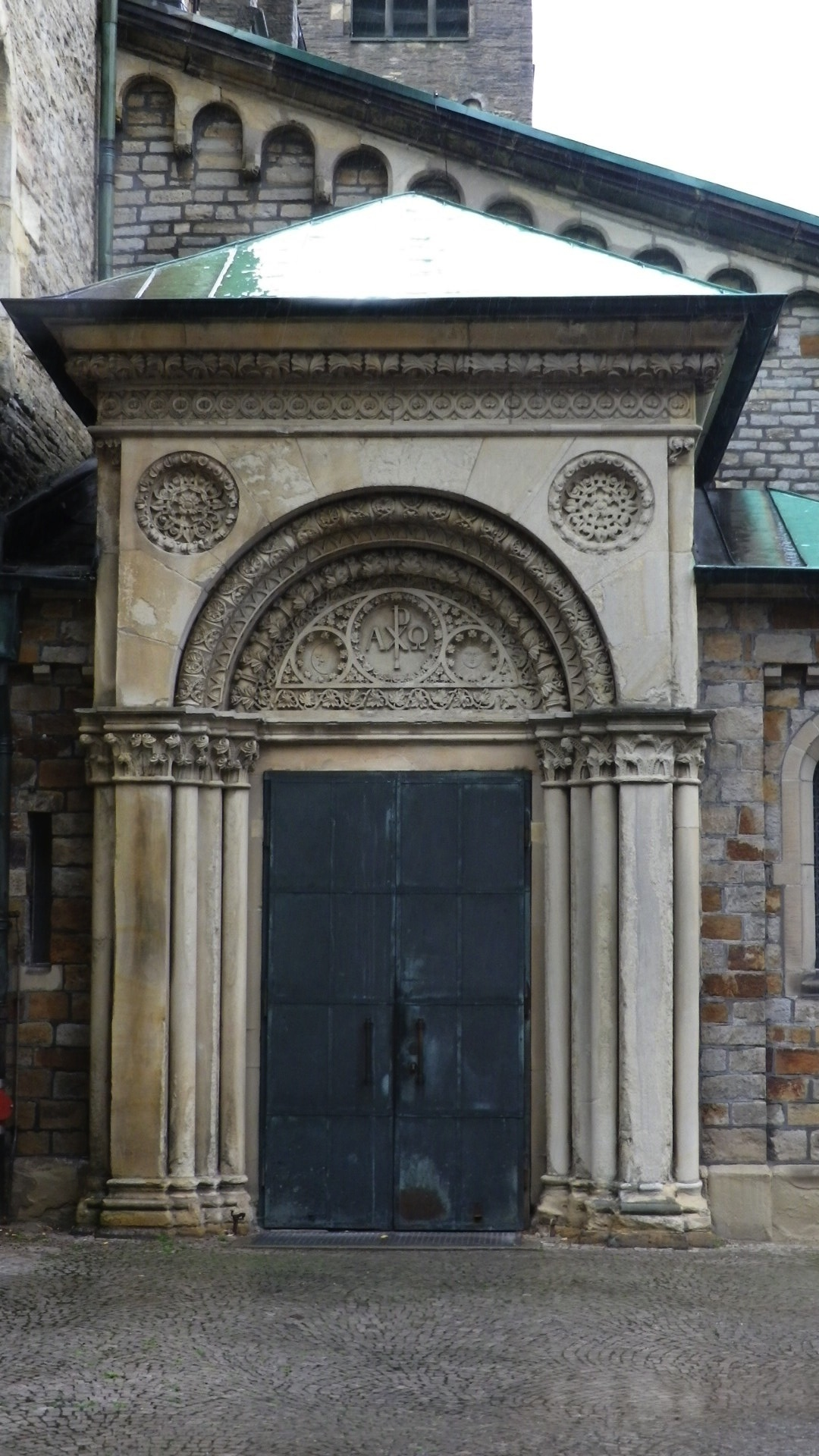 Südlicher Seiteneingang der St. Mauritz-Kirche (Münster)